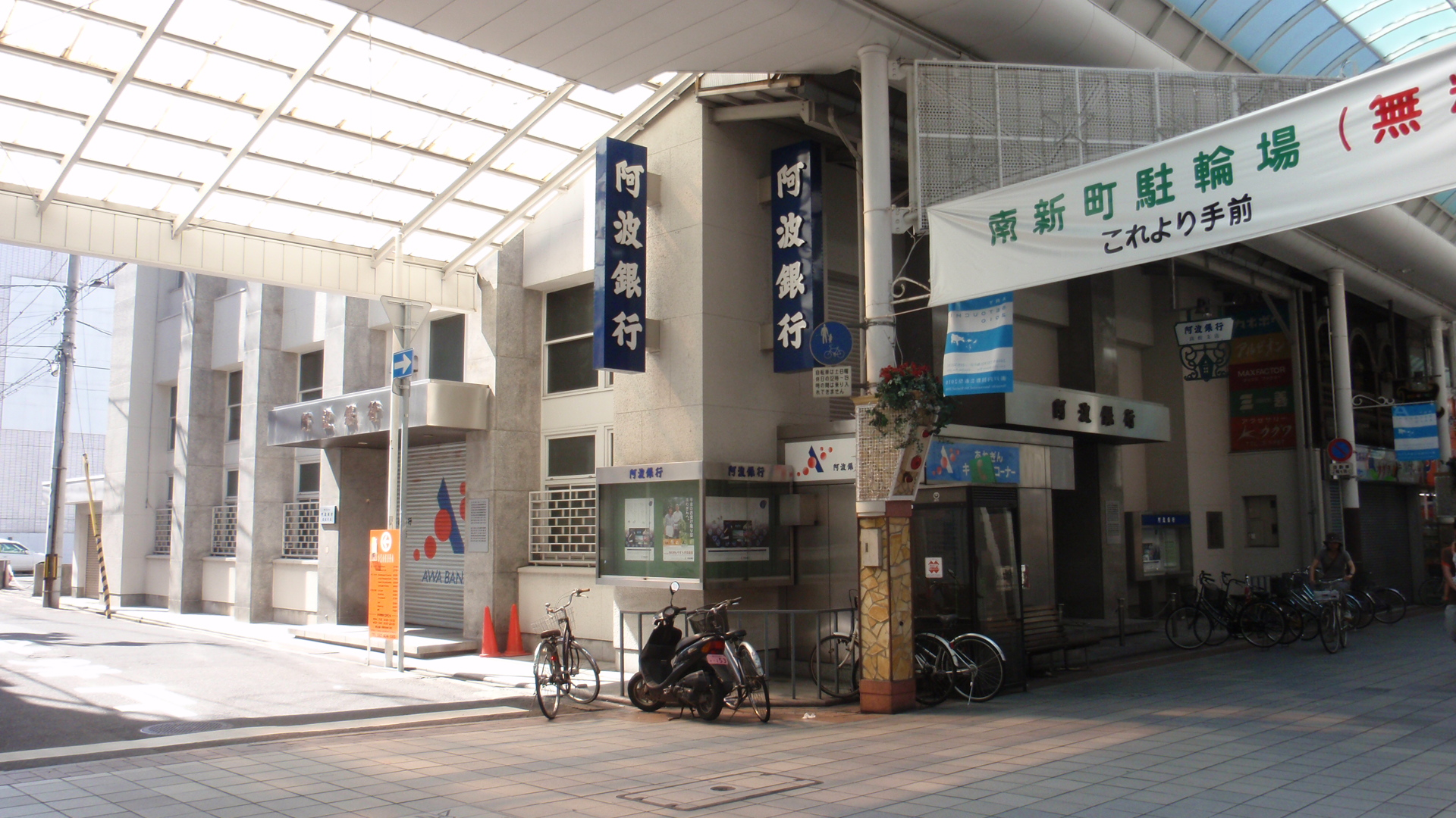 香川県高松市南新町2番地2にある阿波銀行高松支店。 沿革 1947年（昭和22年）7月23日 - 阿波商業銀行本店高松特別出張所として高松市北亀井町8番地の2に開設。 1948年（昭和23年）6月21日 - 高松市南新町22番地の4に移転。 1949年（昭和24年）6月21日 - 支店に昇格。 1950年（昭和25年）4月10日 - 高松市南新町22番地の3に新築移転。 1958年（昭和33年）7月11日 - 戦災復興土地区画整理（第一工区一次）事業により現所在地名に変更。 1961年（昭和36年）7月1日 - 店舗新築のため高松市亀井町3番地の6の仮営業所に移転。 1962年（昭和37年）12月24日 - 元位置に新築移転。 1964年（昭和39年）10月1日 - 商号変更により阿波銀行高松支店となる。 （典拠：『阿波銀行百年史』阿波銀行百年史編纂委員会編、株式会社阿波銀行、1997年）